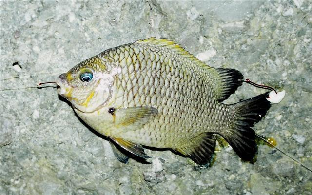 Abudefduf declivifrons, Mexico, Ixtapa